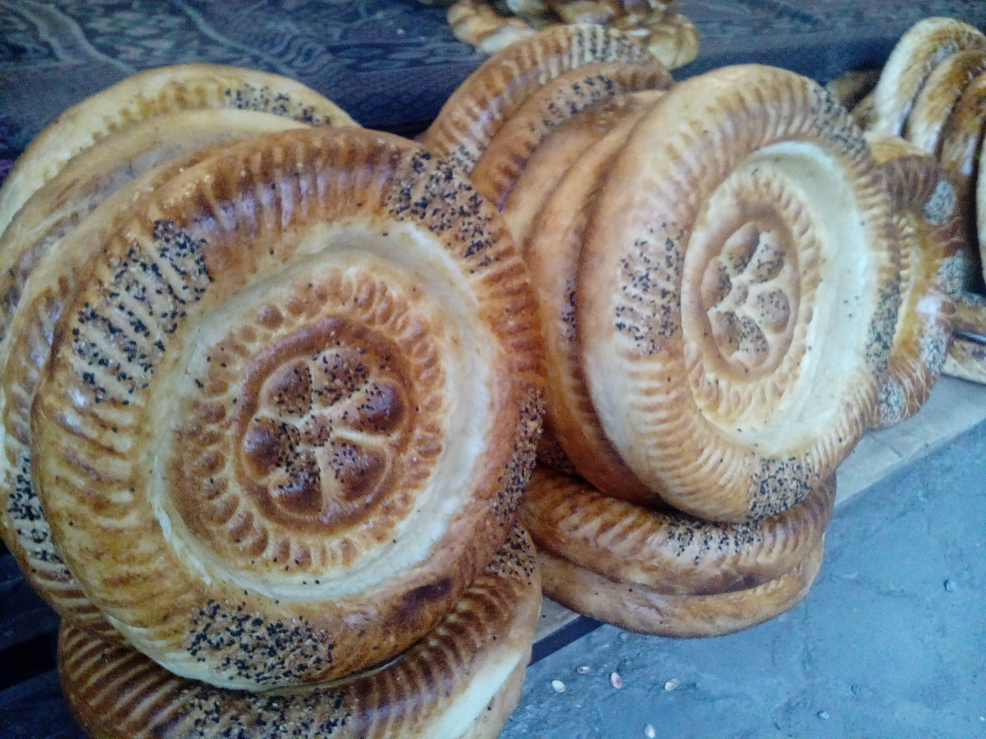 Кыргызча: Базардагы тандыр нан (Бишкек, Кыргызстан)